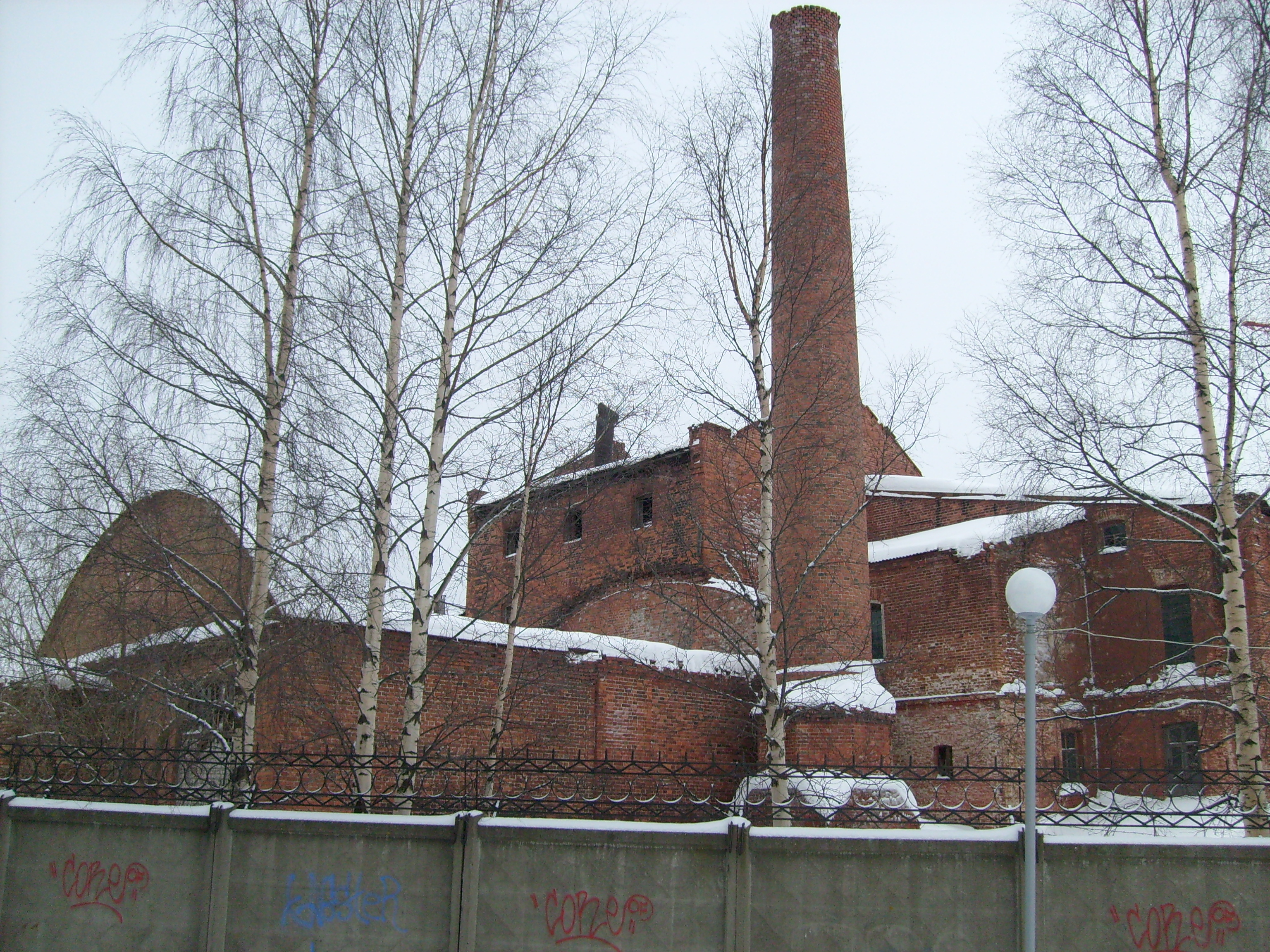 Архангельск, ул. Попова, 3, пивоваренный завод А. Ю. Суркова. 1883—1913